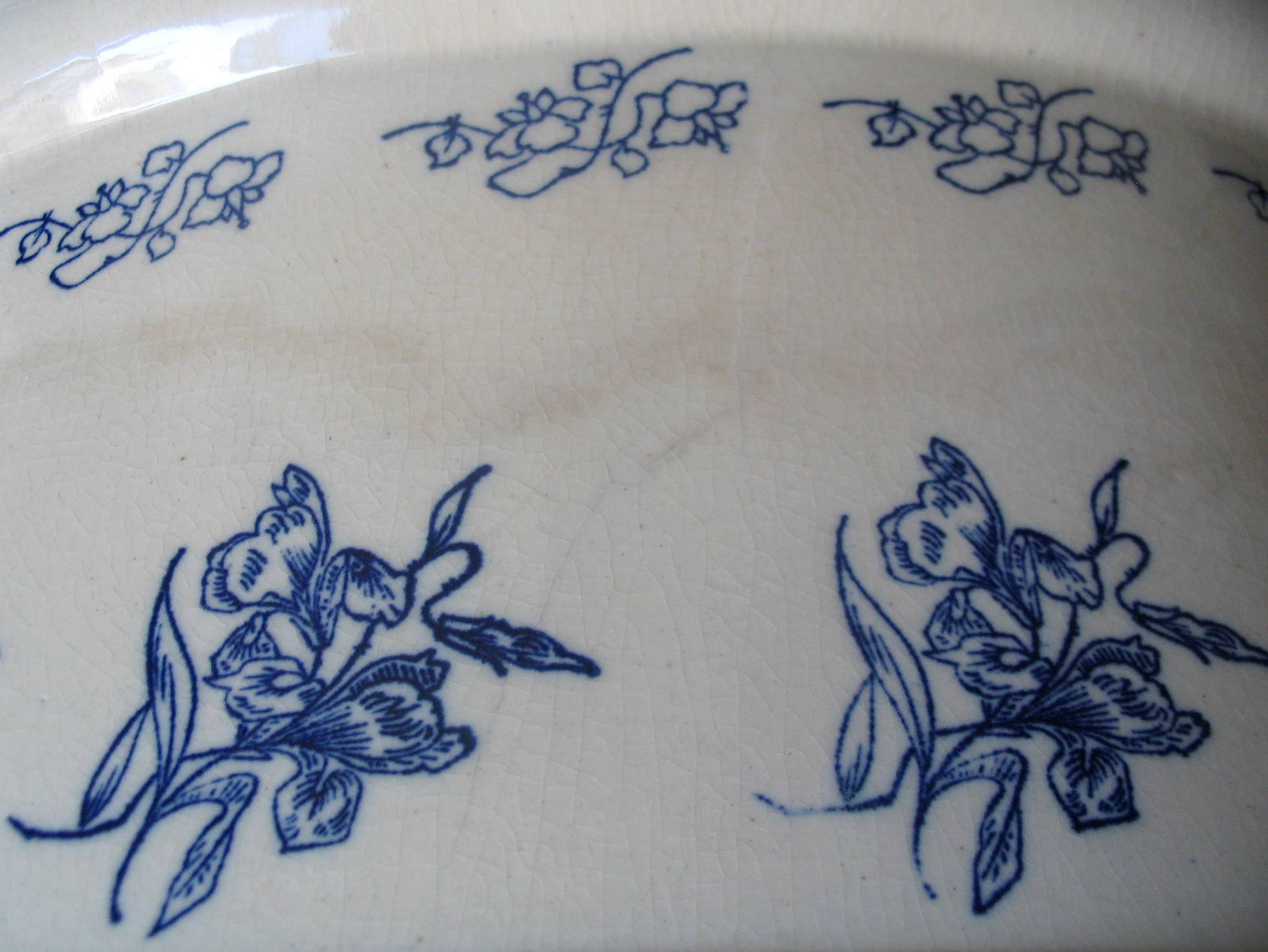 Terrine en grès, Saint-Uze, France, vers 1900. Détail du décor bleu de cobalt au tampon. Manufacture Revol